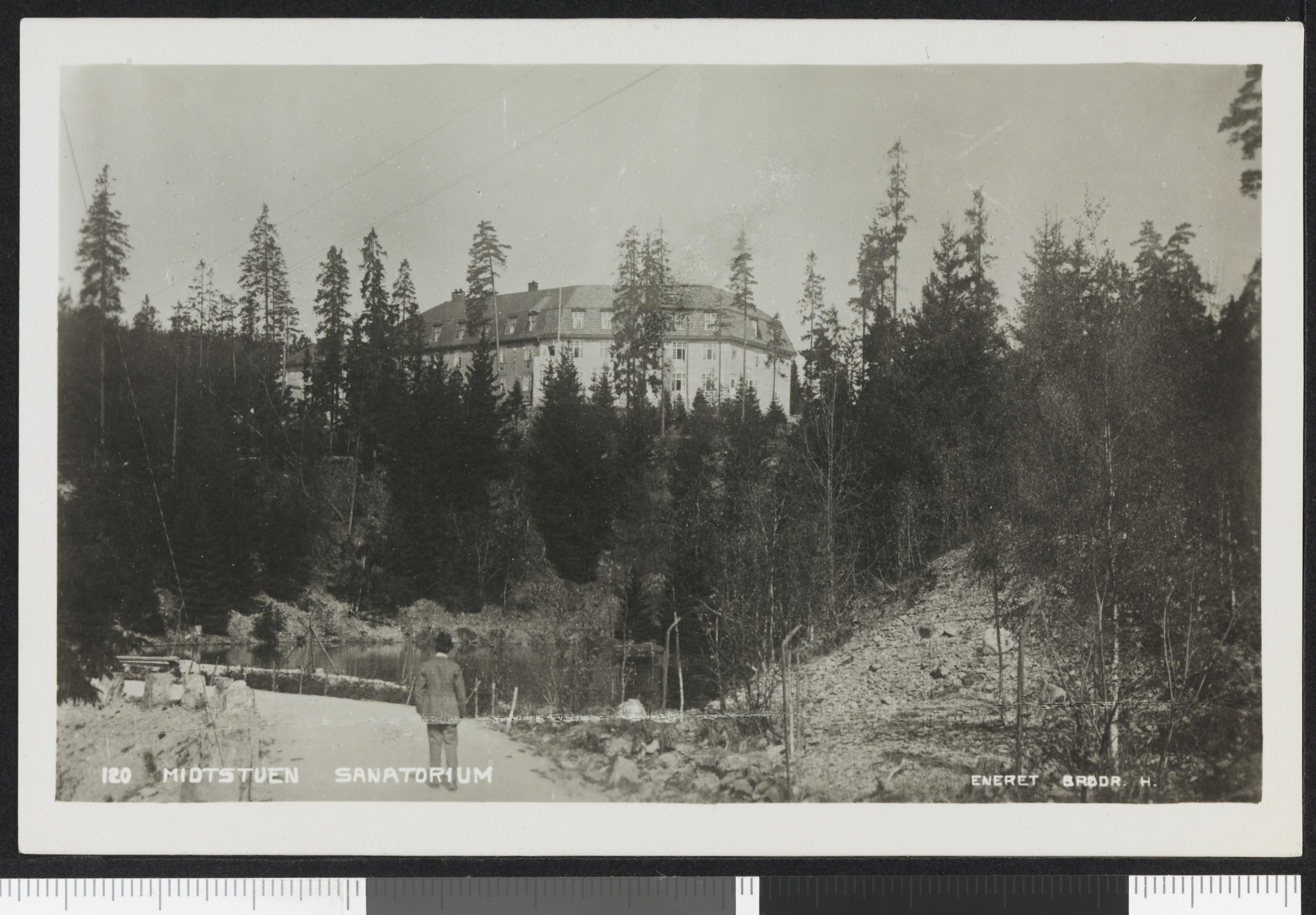 Bildet er hentet fra Nasjonalbibliotekets bildesamling Midtstuen,Midtstuen sanatorium, Oslo, Oslo